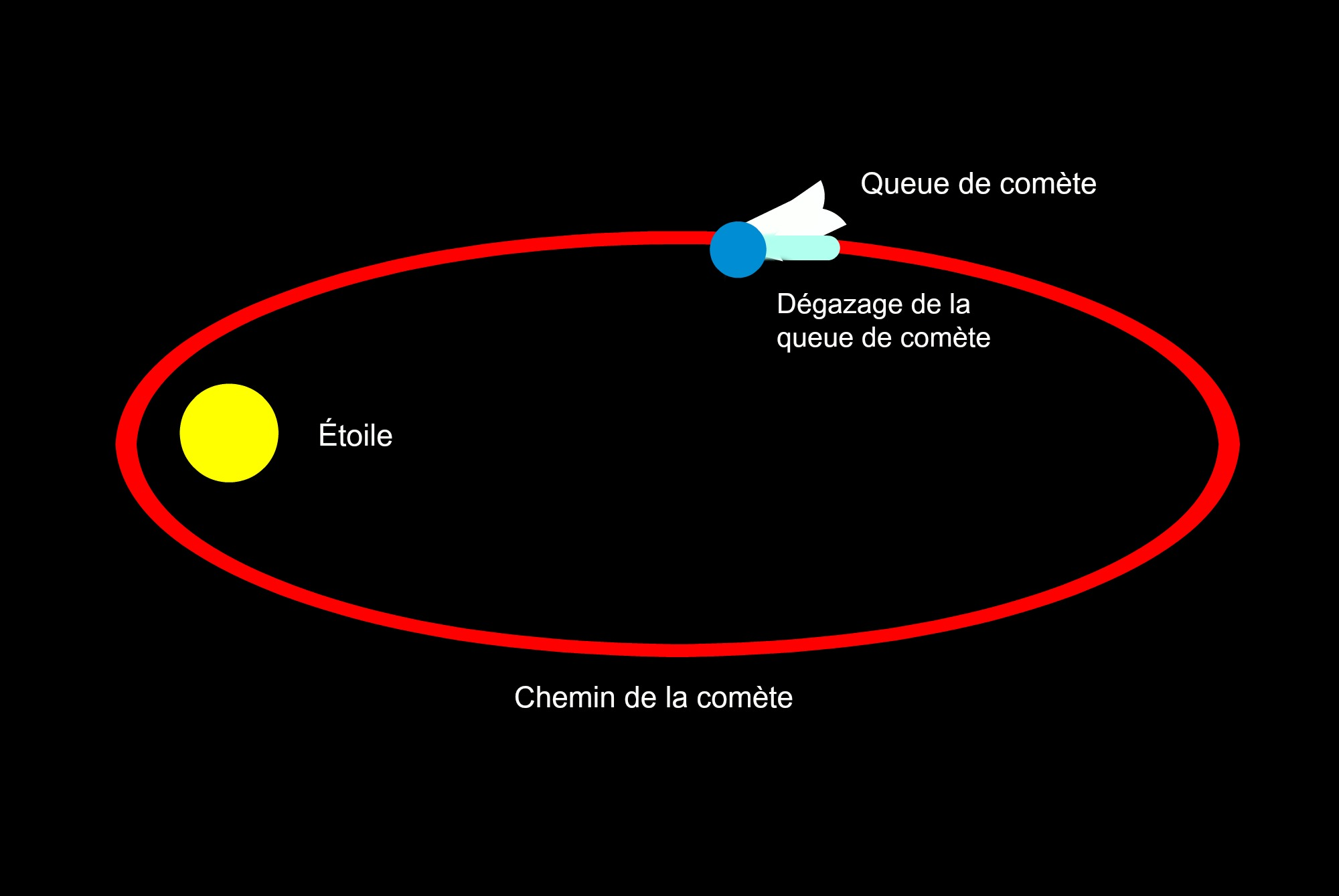 Le trajet d'un comète et son dégazage formant une trainée de poussière et de gaz.